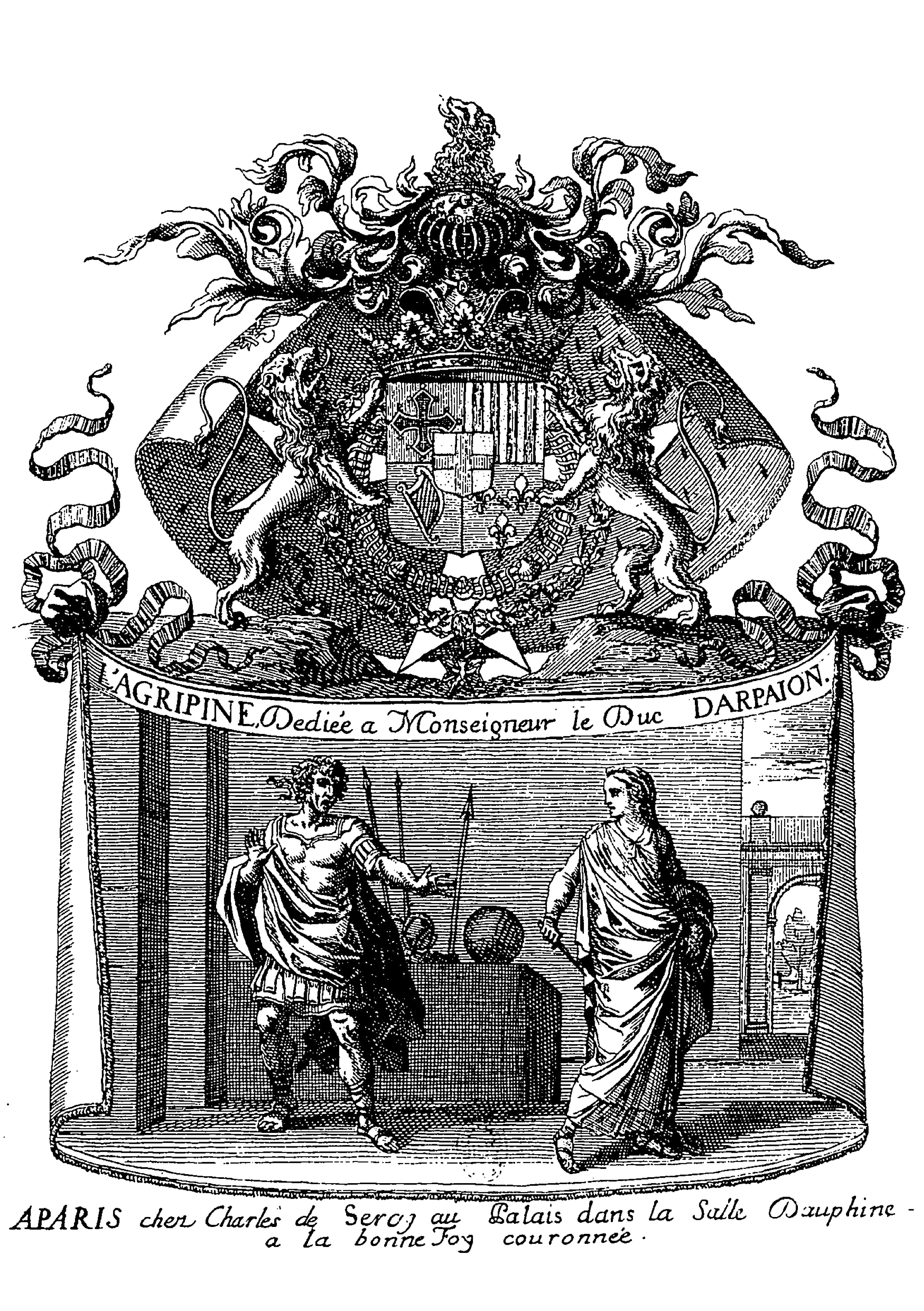 Illustration située à la page deux de la tragédie de La mort d'Agrippine de Savinien Cyrano de Bergerac, dans son édition de 1654.